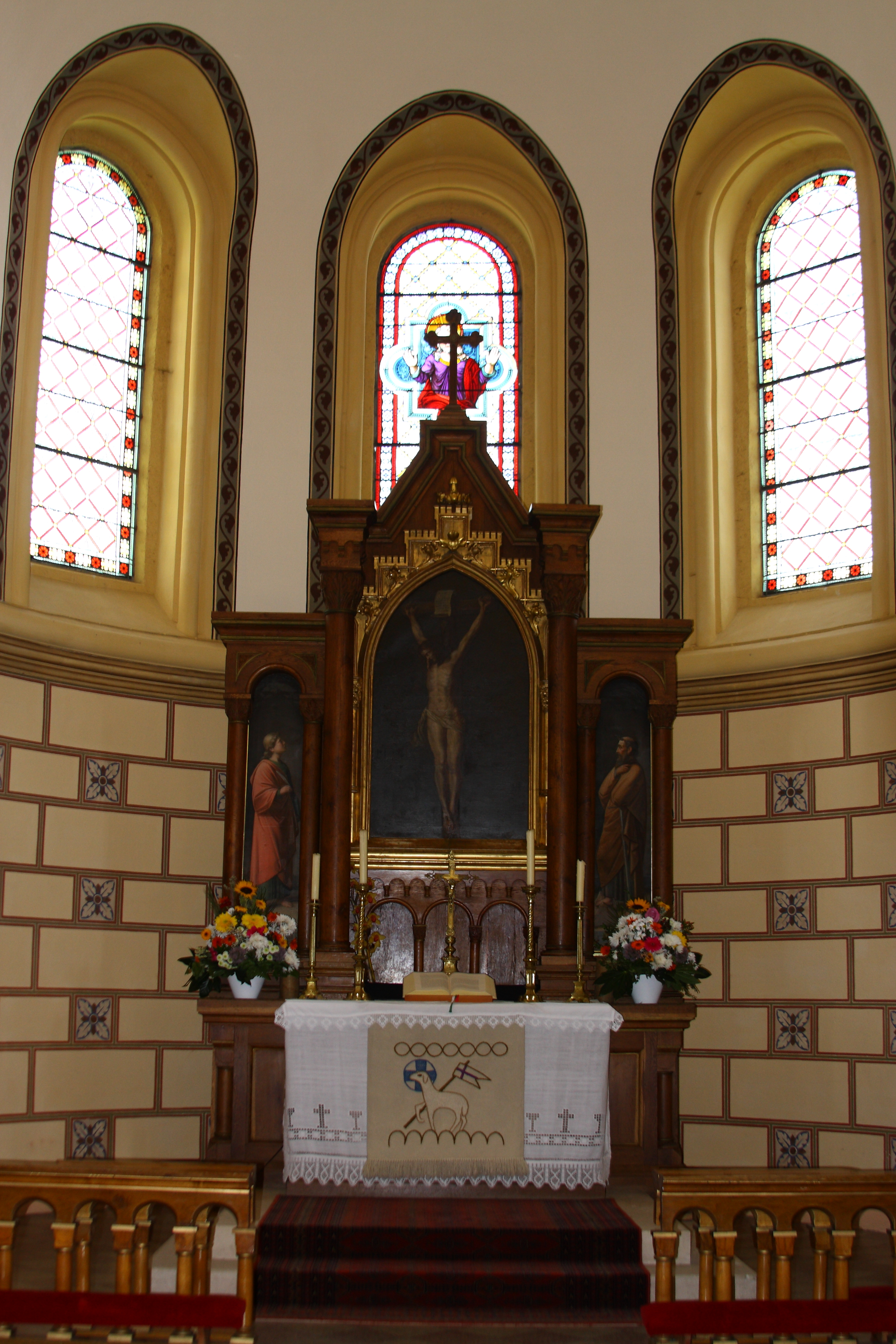 Evang. Pfarrkirche A.B.